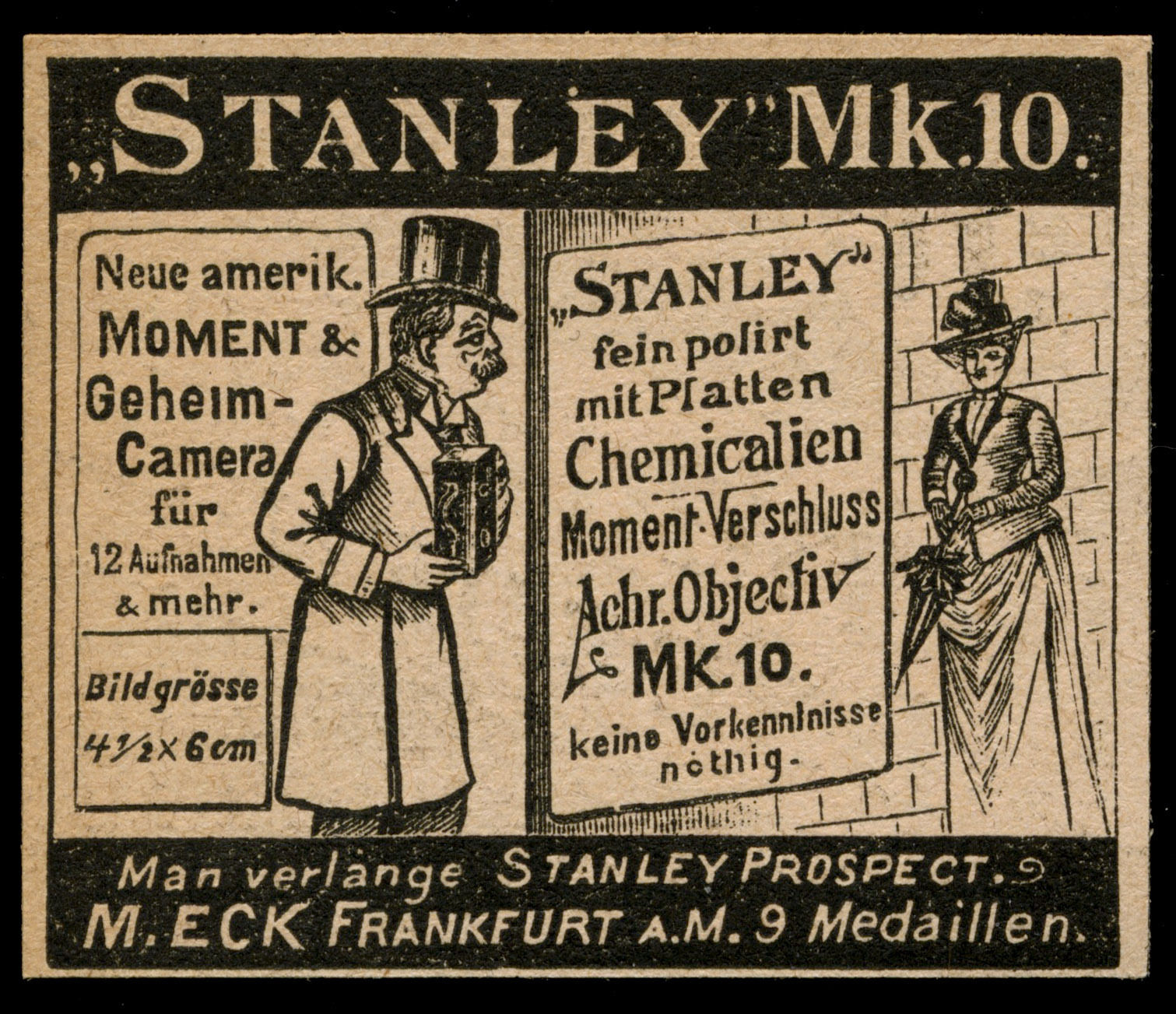 "Stanley" Neue amerikanische Moment & Geheim-Camera für 12 Aufnahmen und mehr. Werbeanzeige von 1890, 4,7 x 3,9 cm